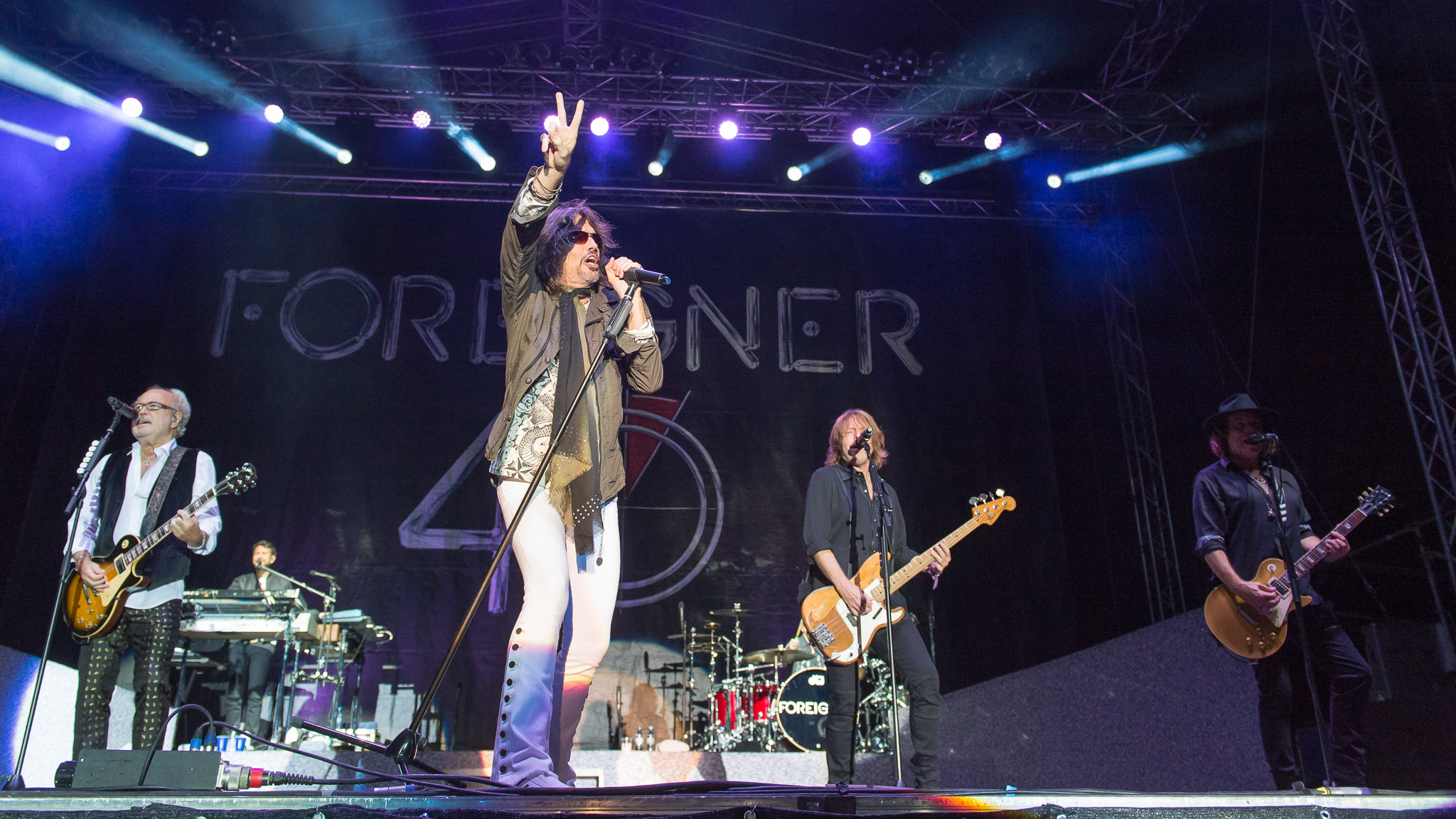 Brombachsee,Concertbüro Franken,Festival,Foreigner,Jeff Pilson,Kelly Hansen,Konzert,Lieder am See,Livekonzert,Livemusik,Michael Bluestein,Mick Jones,Musik,Thom Gimbel